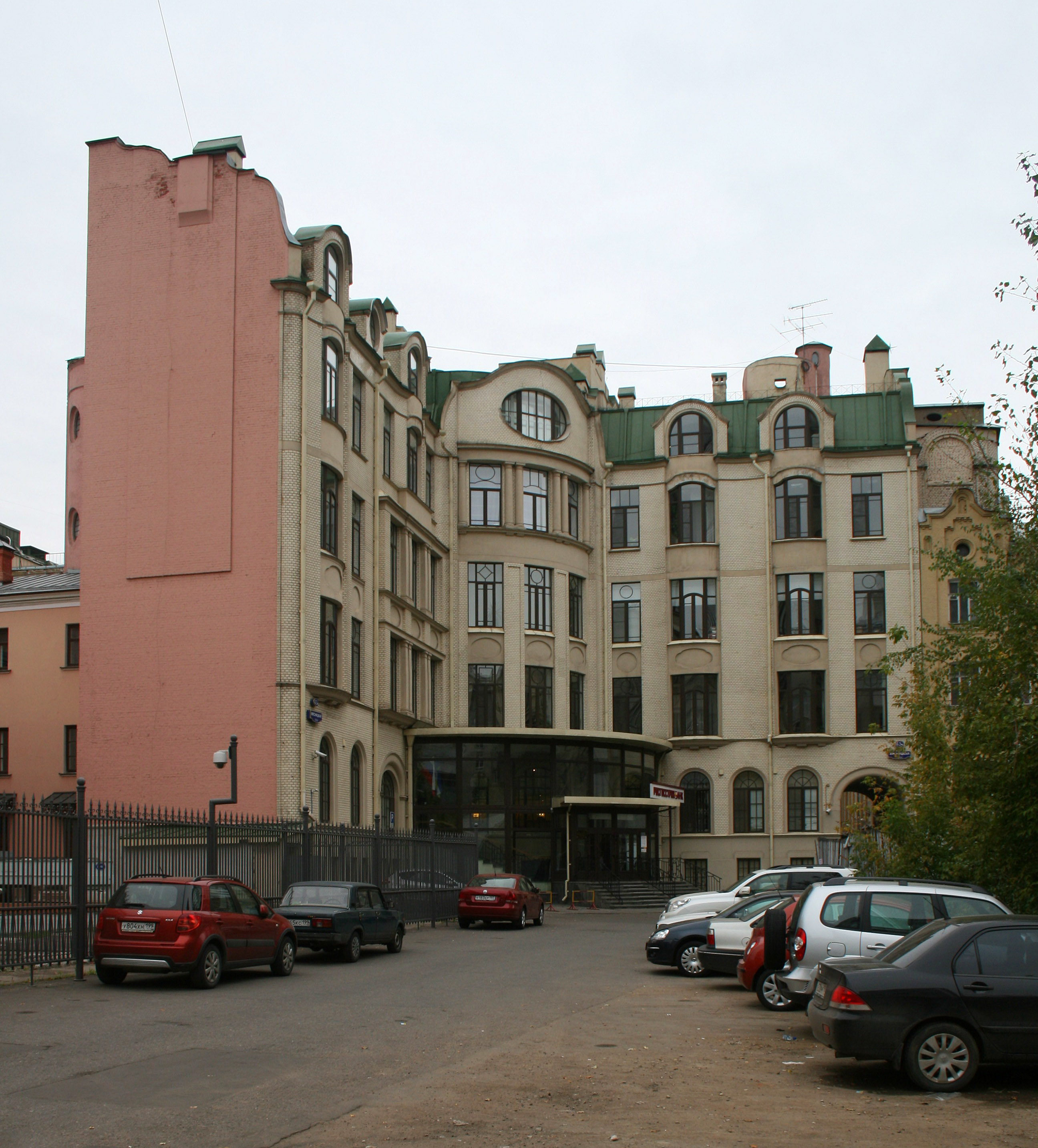 Москва, ул. Мясницкая 43, стр. 2. Учебный корпус Реального училища К.П. Воскресенского, 1906 г., арх. А. Кузнецов. Здесь в разные годы преподавали: хирург Т.П. Краснобаев, зоолог Н.Ф. Золотницкий, историк С.К. Богоявленский и др. Ныне в здании расположено представительство Республики Бурятия при президенте РФ.